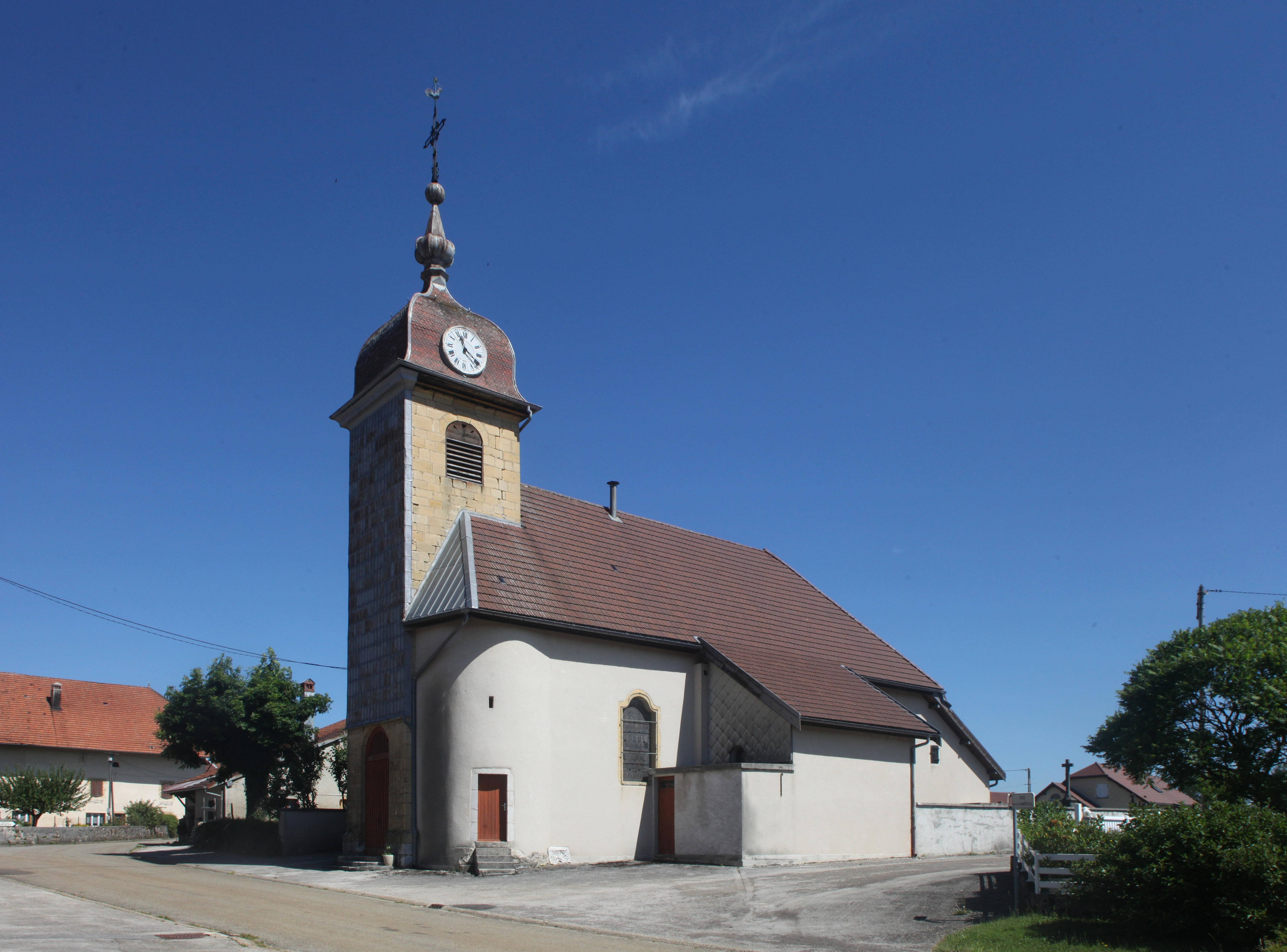 Église de Plénise (Jura).